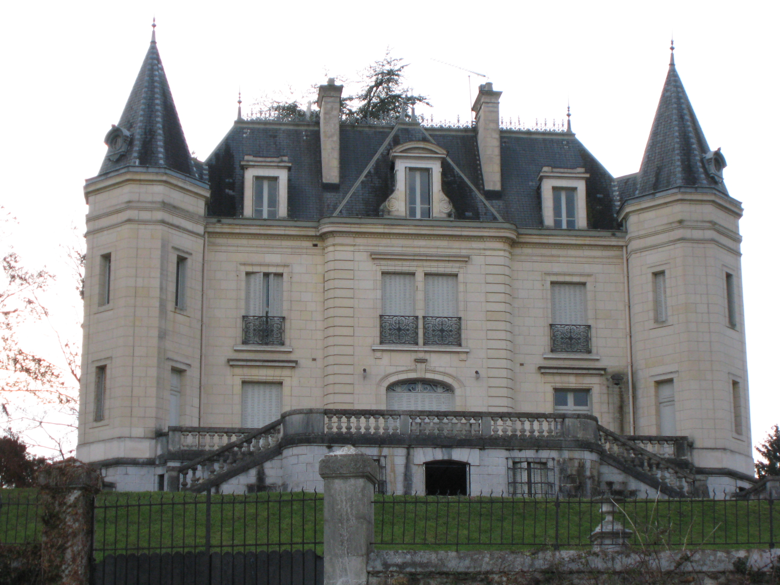 Chateau de Gurs vu depuis la voie rapide (Pyrénées-Atlantiques) (Pyrénées).